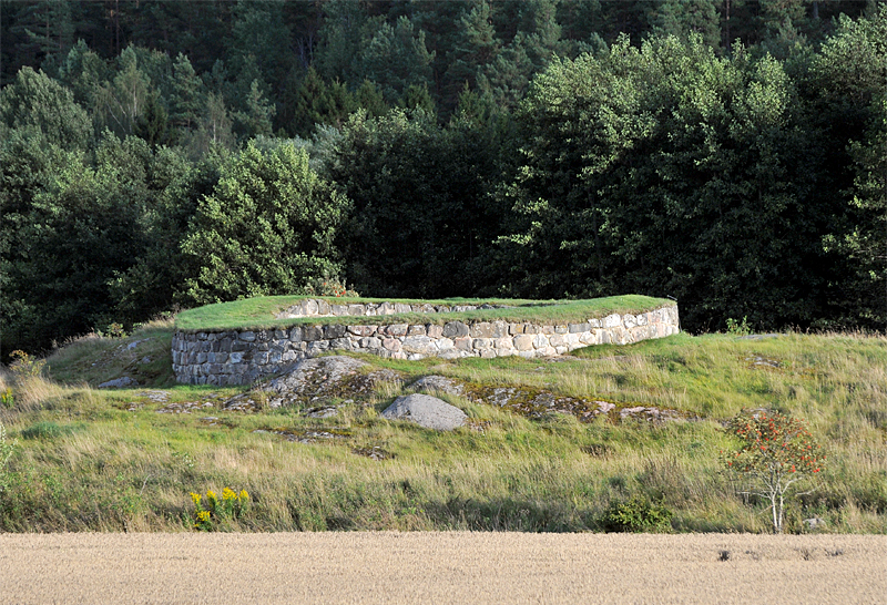 Kilakastalen. Borg. Nyköping 45:1.